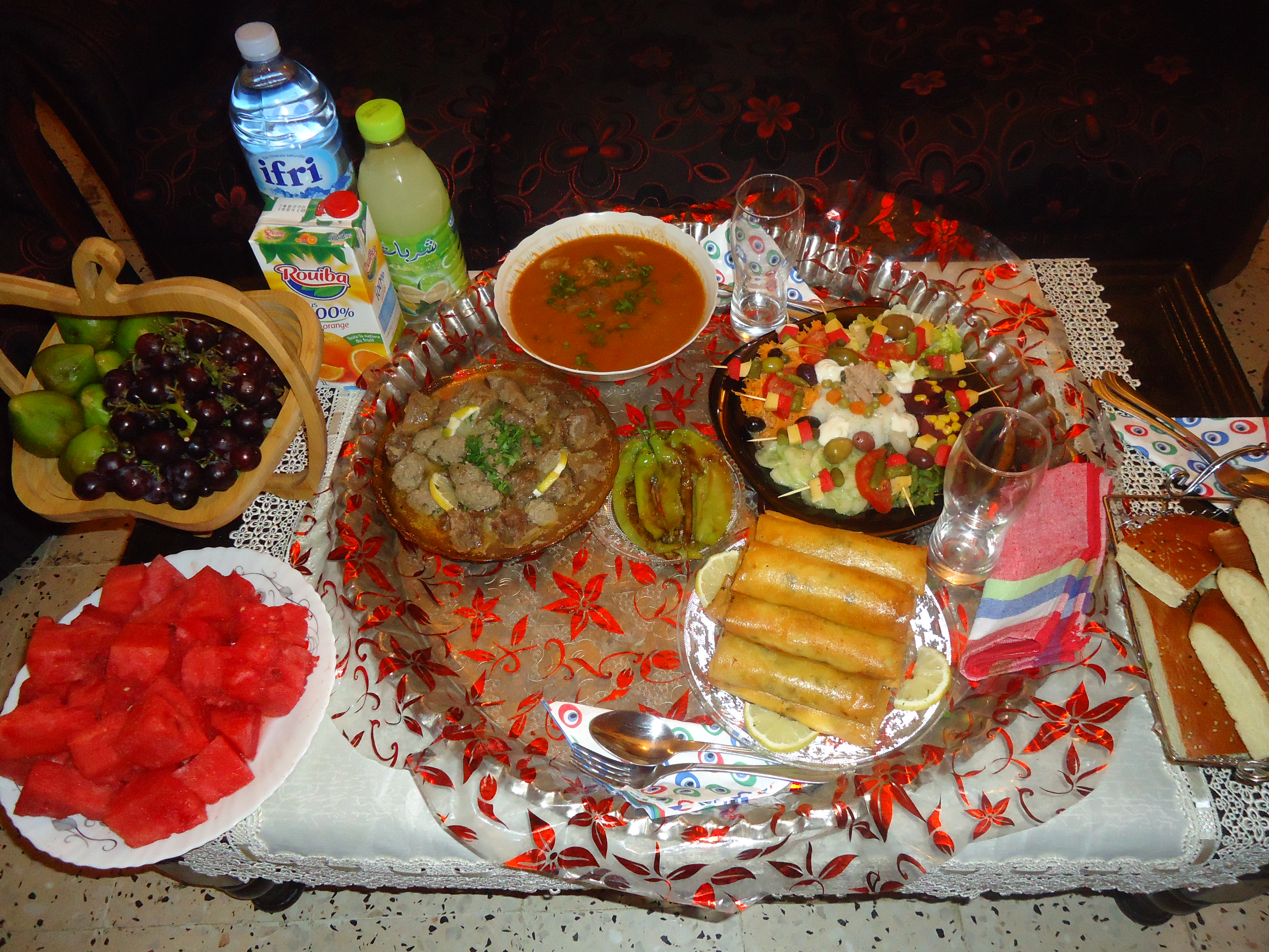 bourek , soupe , salade variée , tajin echwa dessert ,pain fait à la maison This is an image of food from Algeria